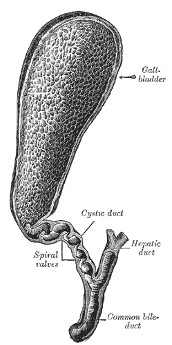 Gray1095 Vesica fellea